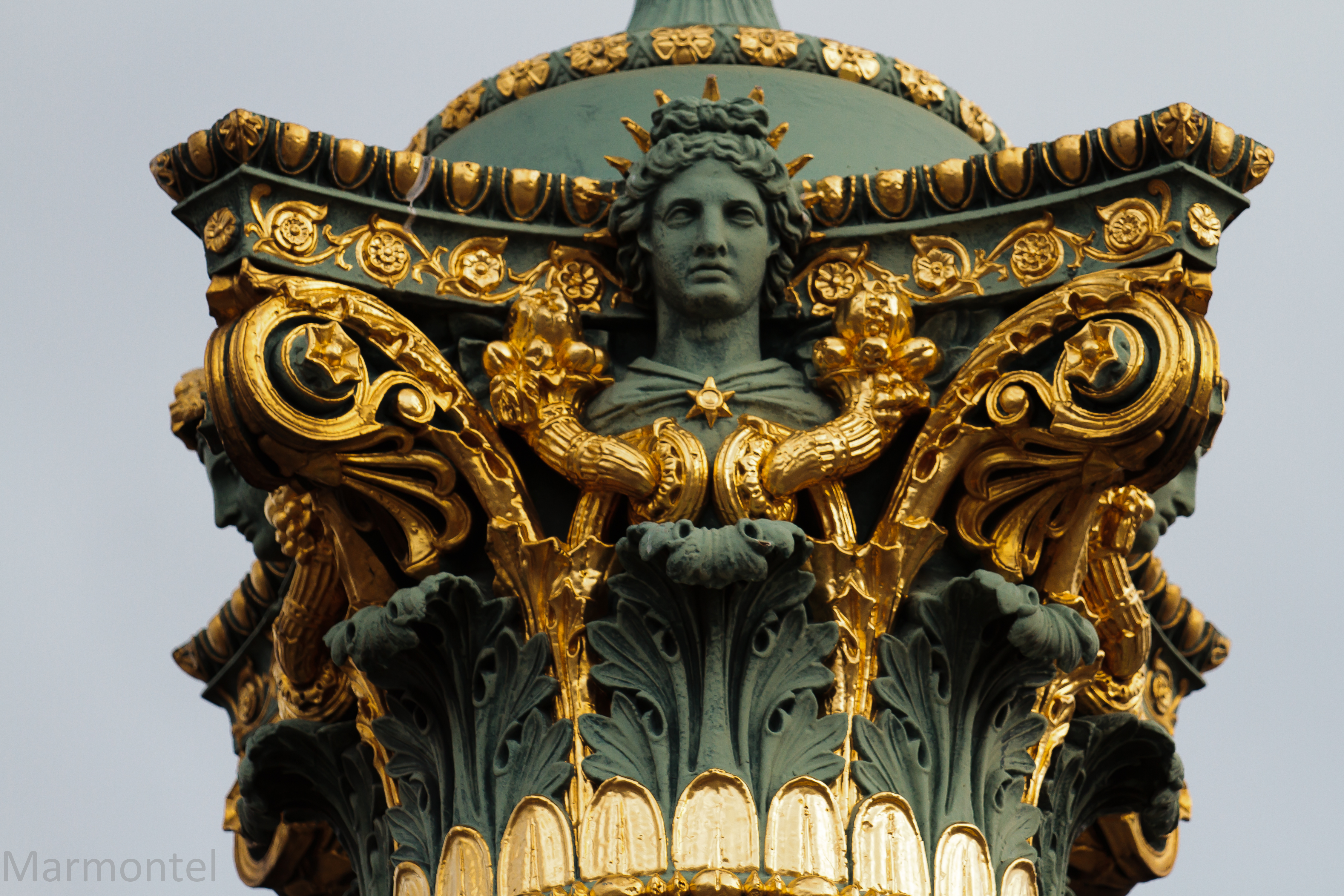 Réverbère de la place de la Concorde, Paris, France.